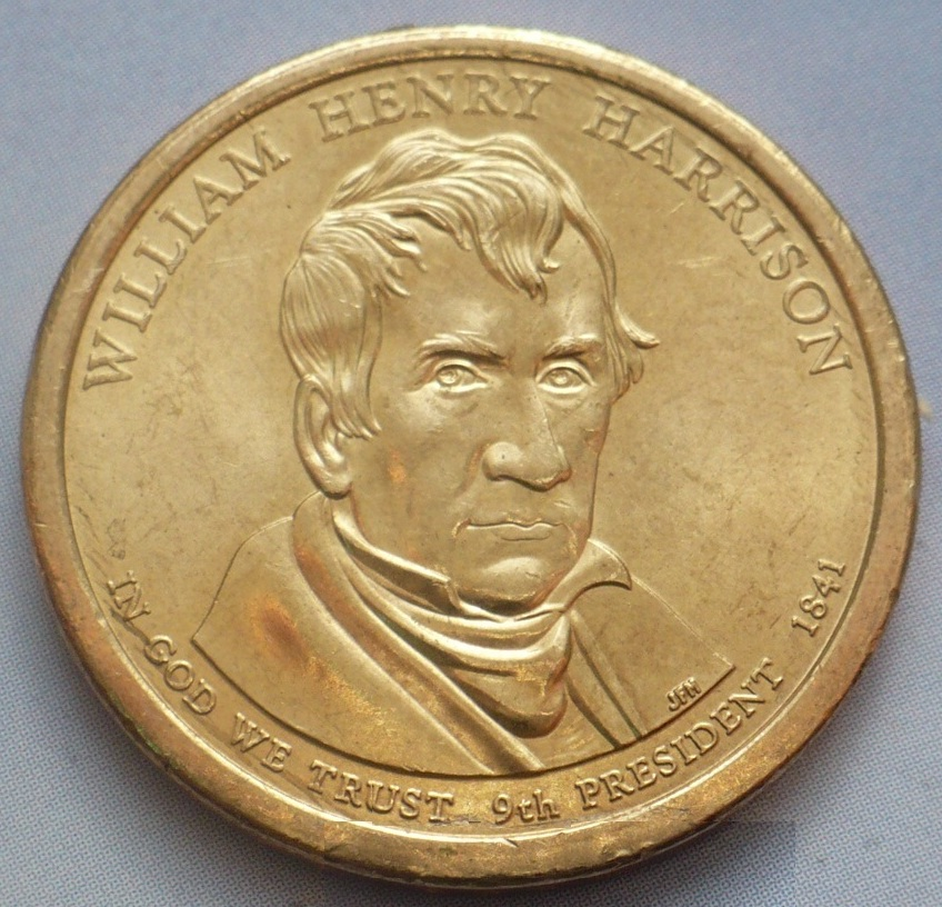 Изображение/Монета 1 доллар США